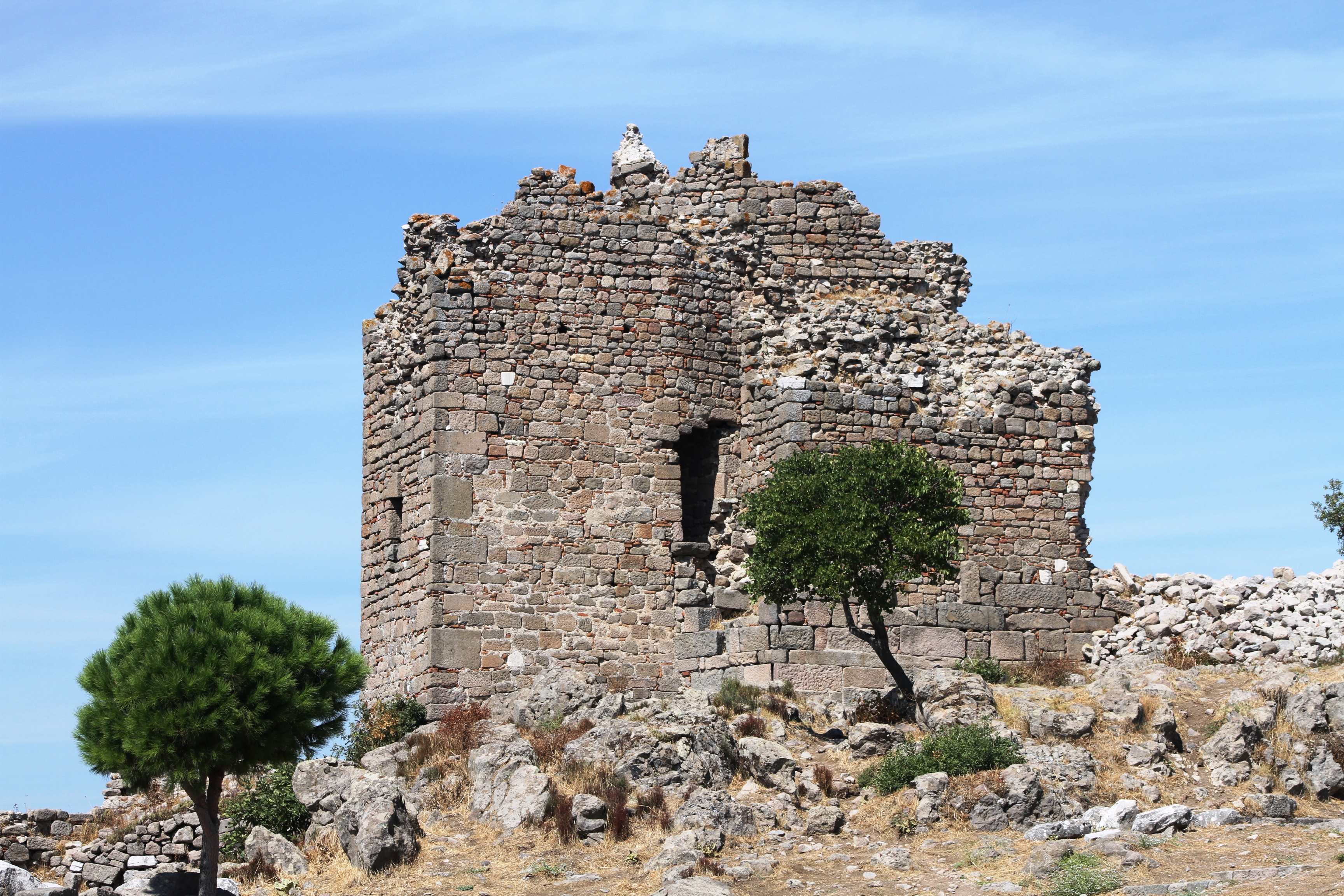 Ruínas na Acrópole de Pérgamo